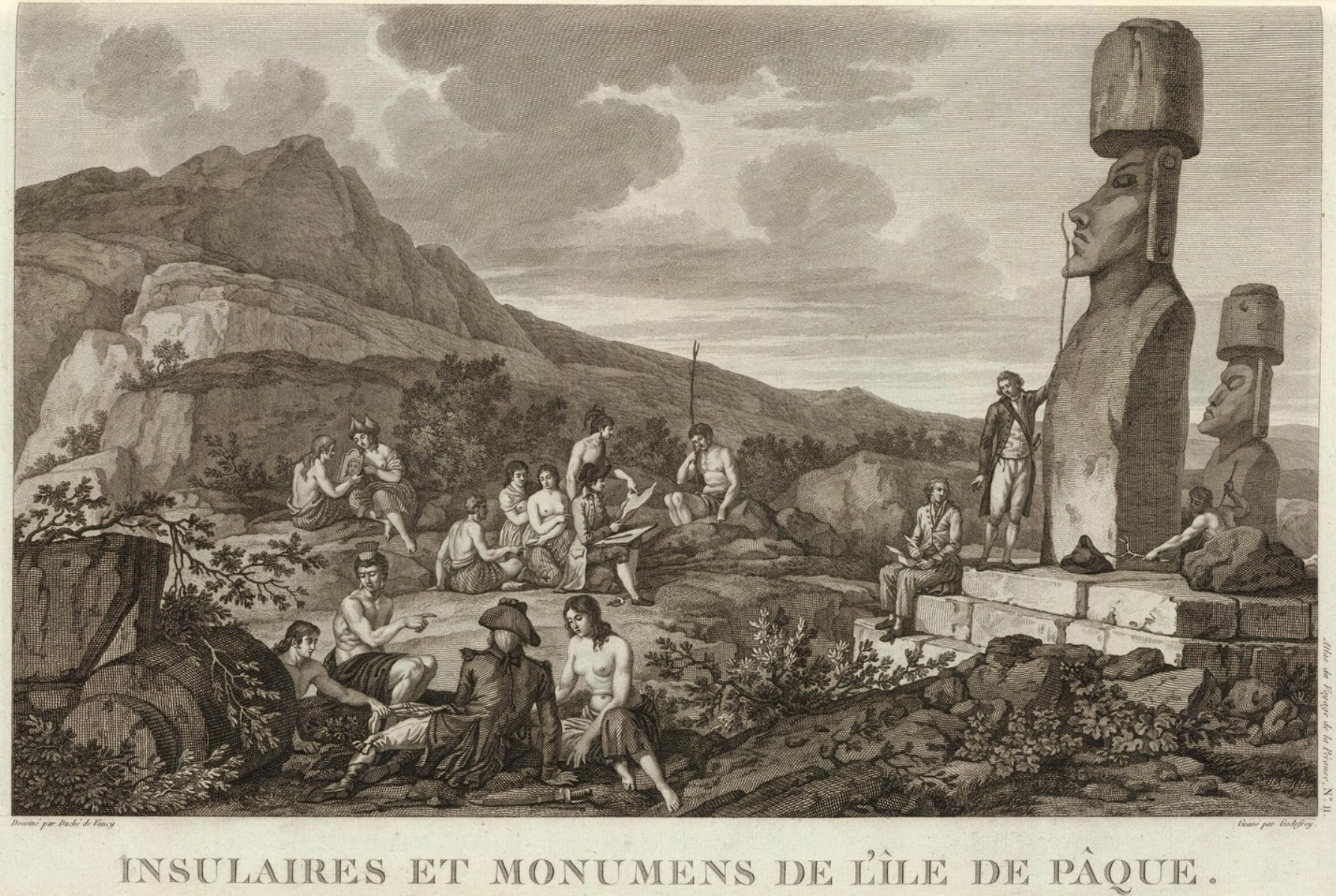 Population de l'île de Pâques et statues Moai lors de la visite de l'expédition La Pérouse en 1786.